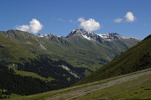 Calfeisental